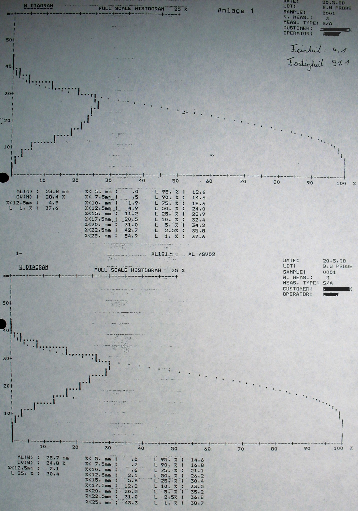 Stapeldiagramm (Almeter) einer langstapeligen Baumwolle